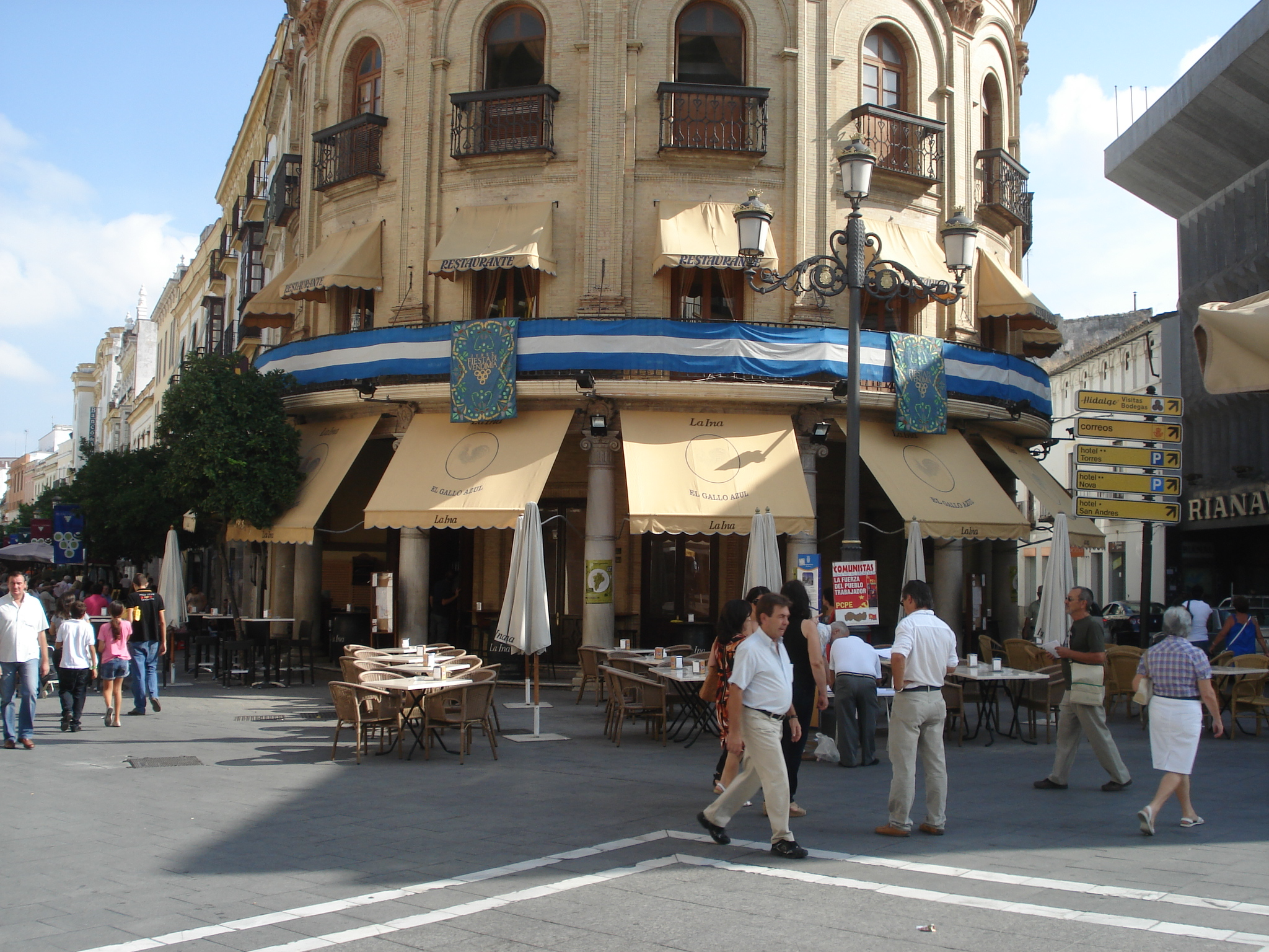 Fiestas de Otoño Jerez 2011